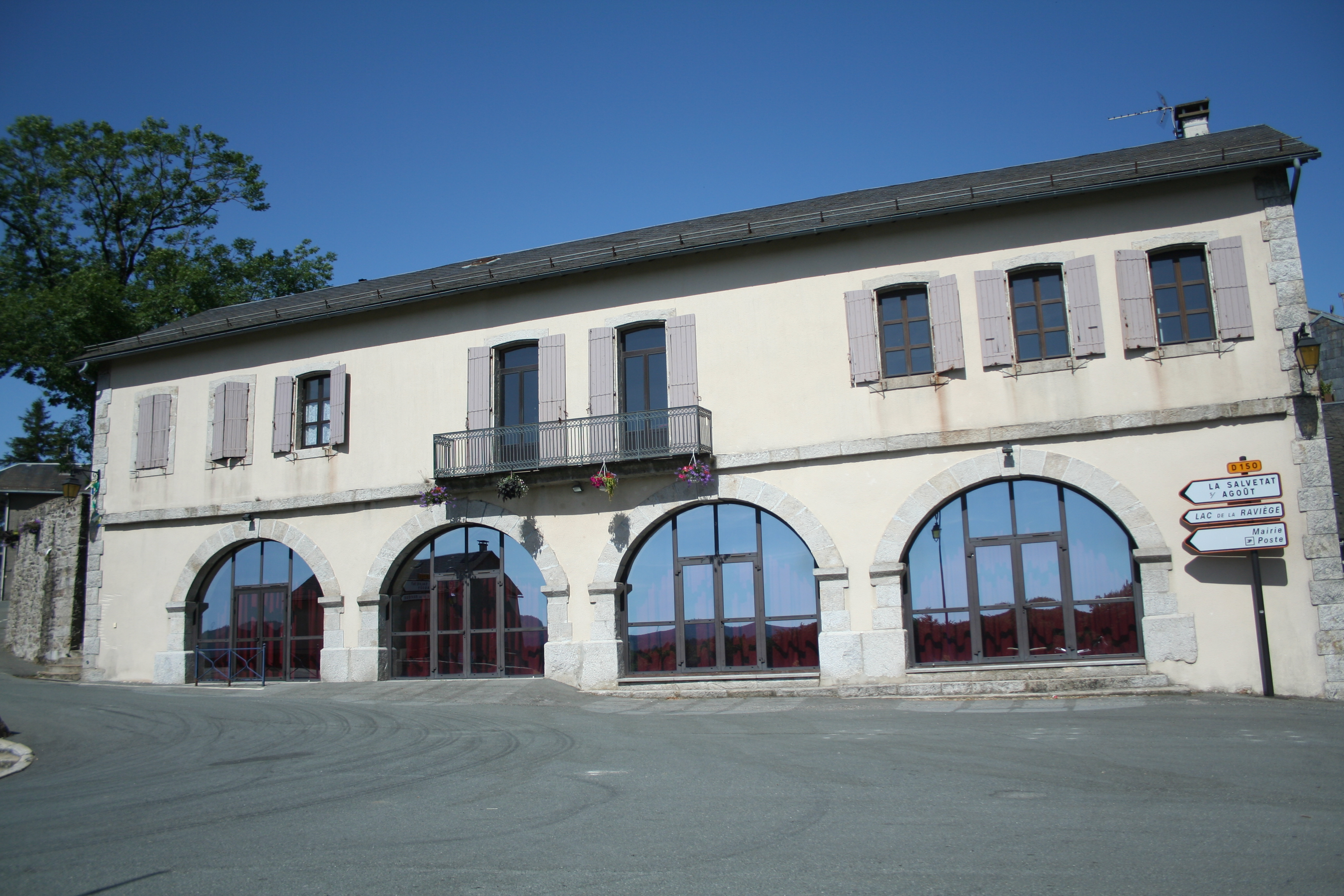 Le Soulié (Hérault) - mairie.